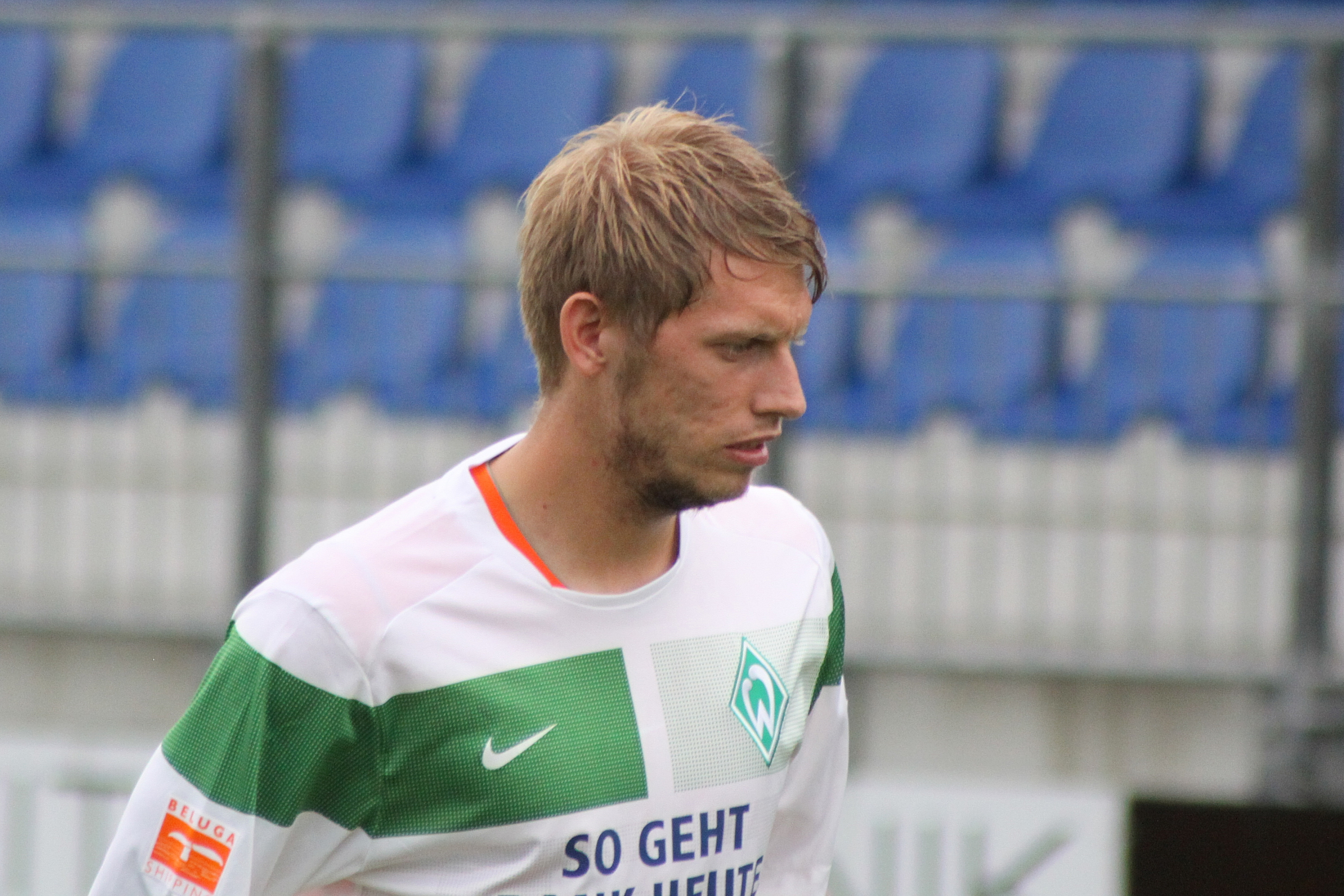 Aaron Hunt - SV Werder Bremen (2)